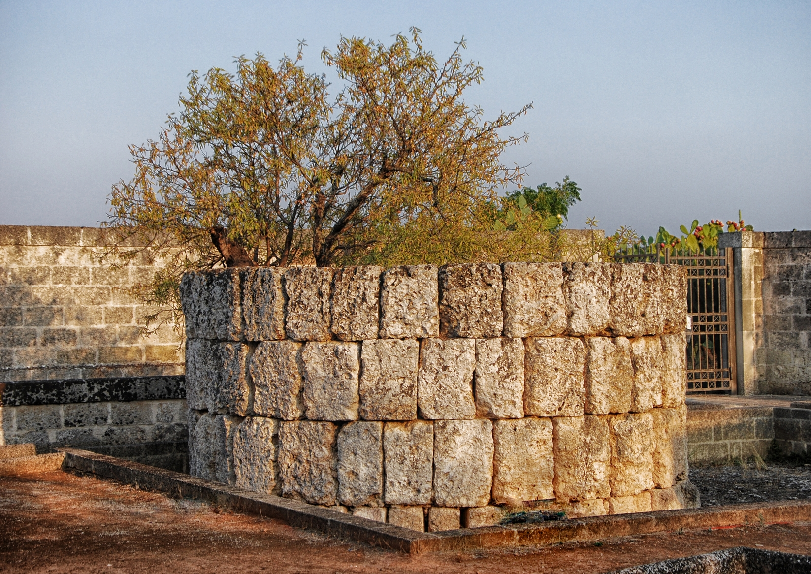 Parco archeologico delle Mura Messapiche - Fonte Pliniano This is a photo of a monument which is part of cultural heritage of Italy.